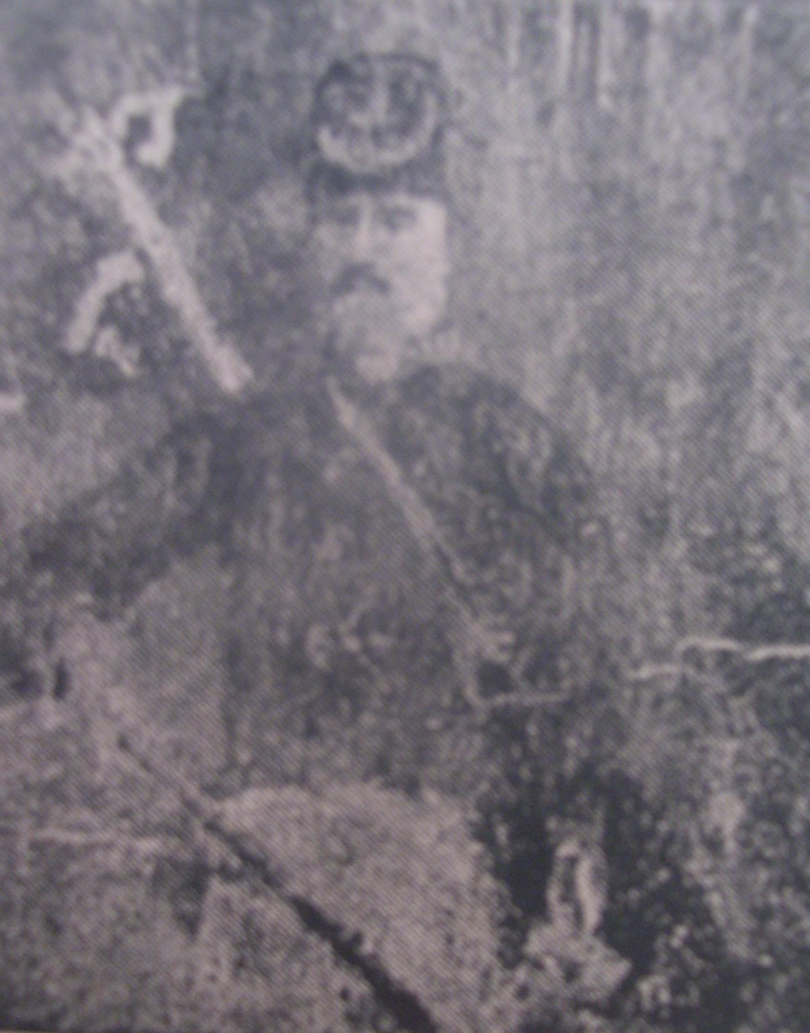 Революционерът Янче Пантулев.